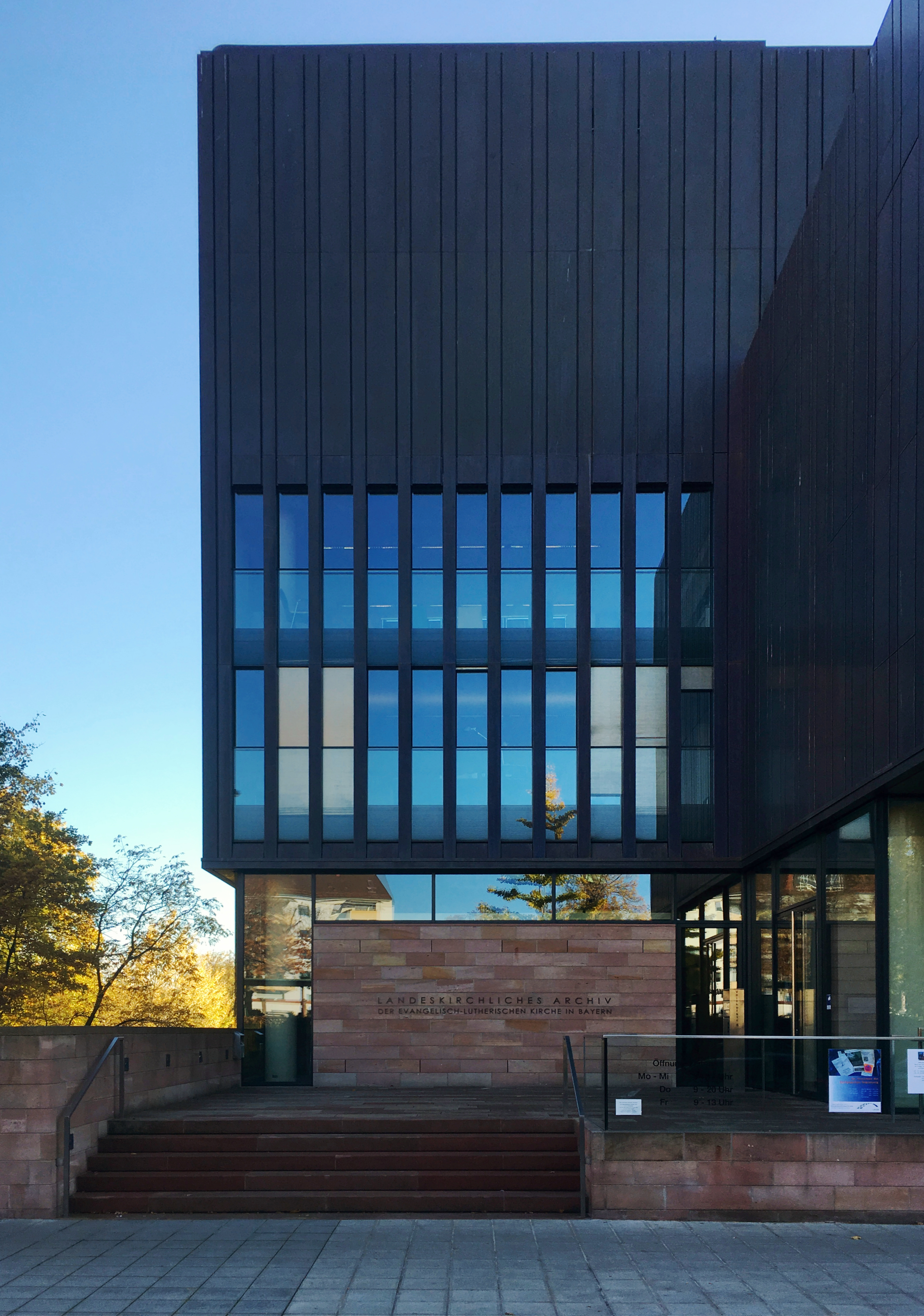 Landeskirchliches Archiv der bayerischen Evangelisch-Lutherischen Kirche in Nürnberg